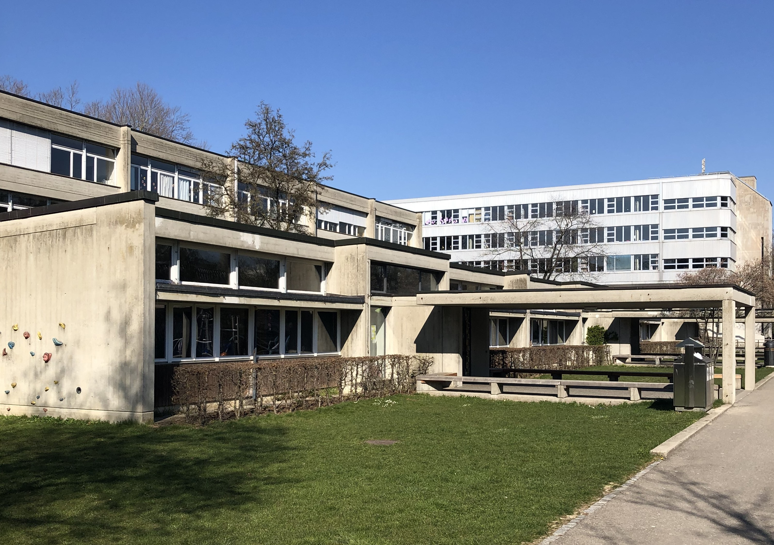 Schule Tscharnergut